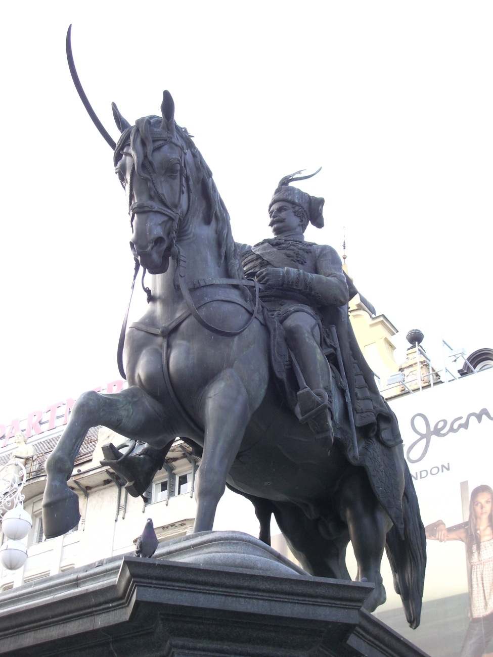 Spomenik banu Josipu Jelačiću, rad Antona Dominika Fernkorna u Zagrebu